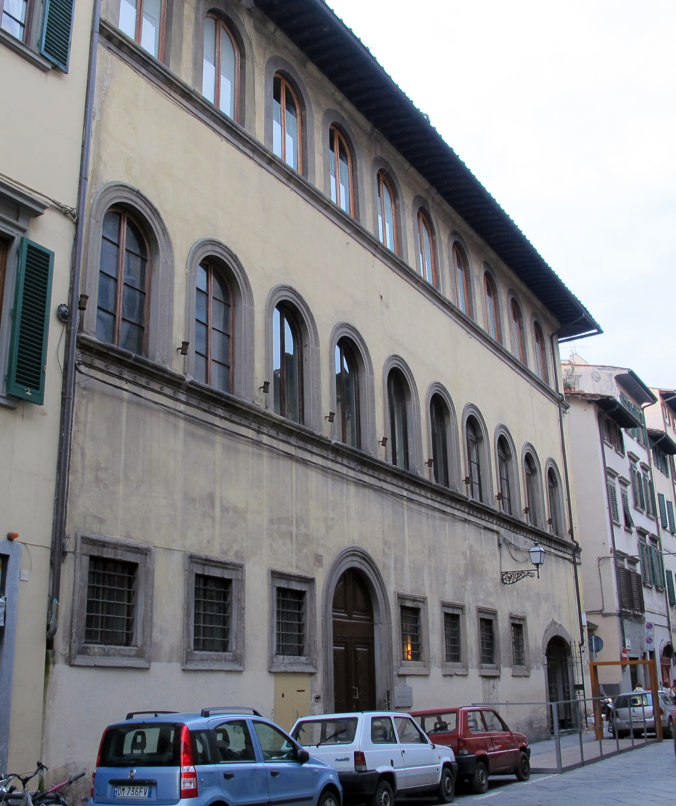 Via ghibellina, palazzo gherardi